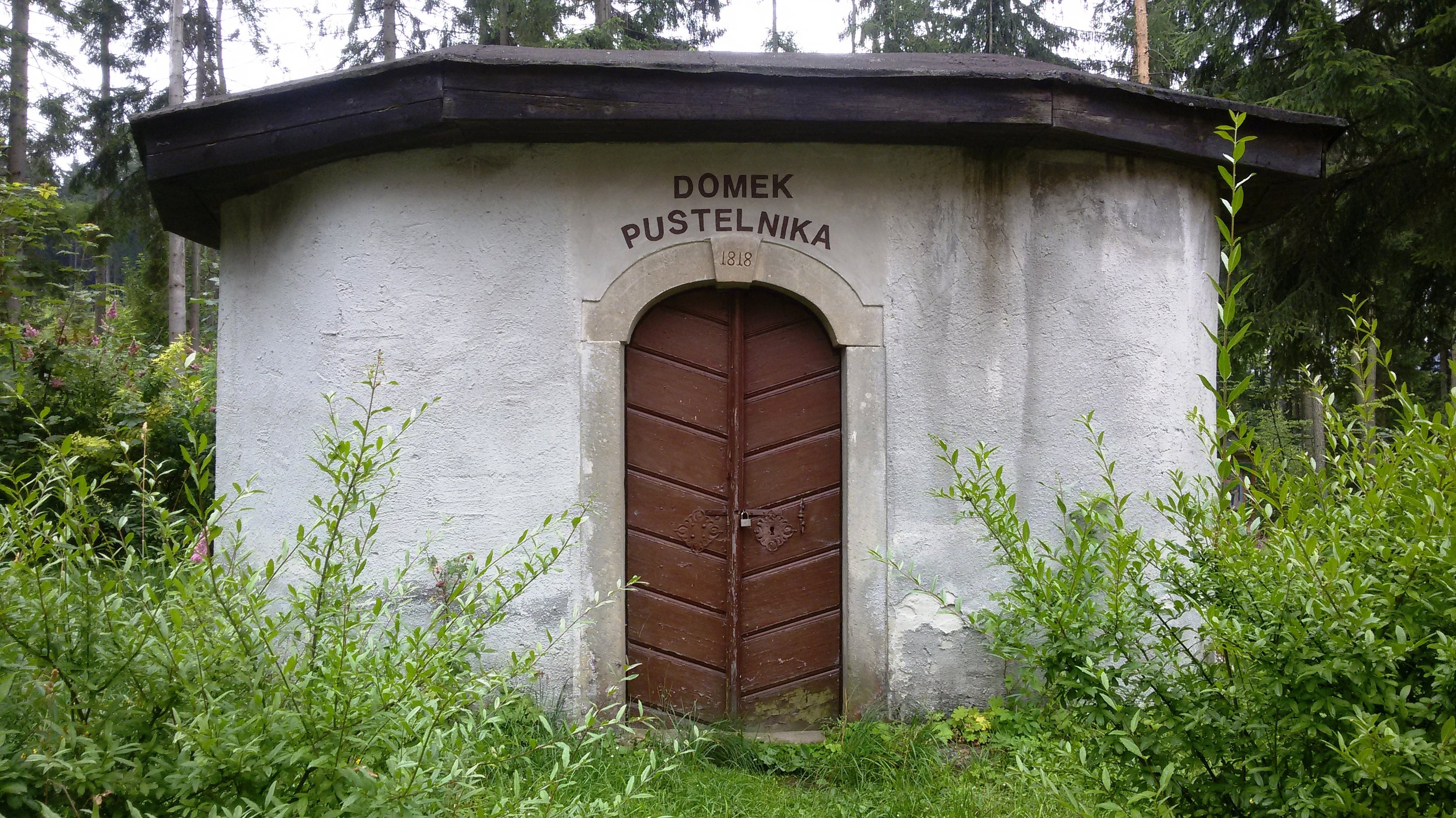 Kaplica św. Anny na Rogu w Zaworach k/Chełmska Śl.